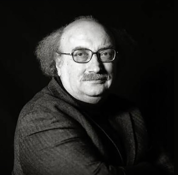 Salvatore Giannella